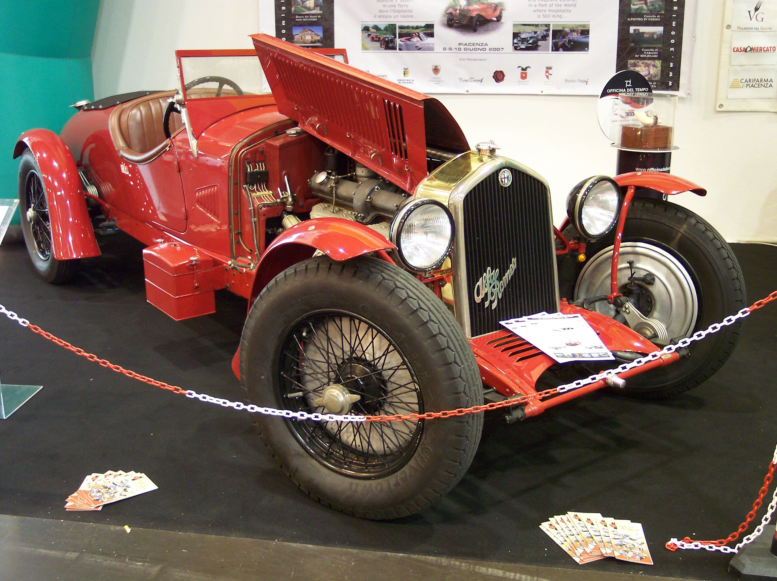 Alfa Romeo 8C 2300 Le Mans 1931